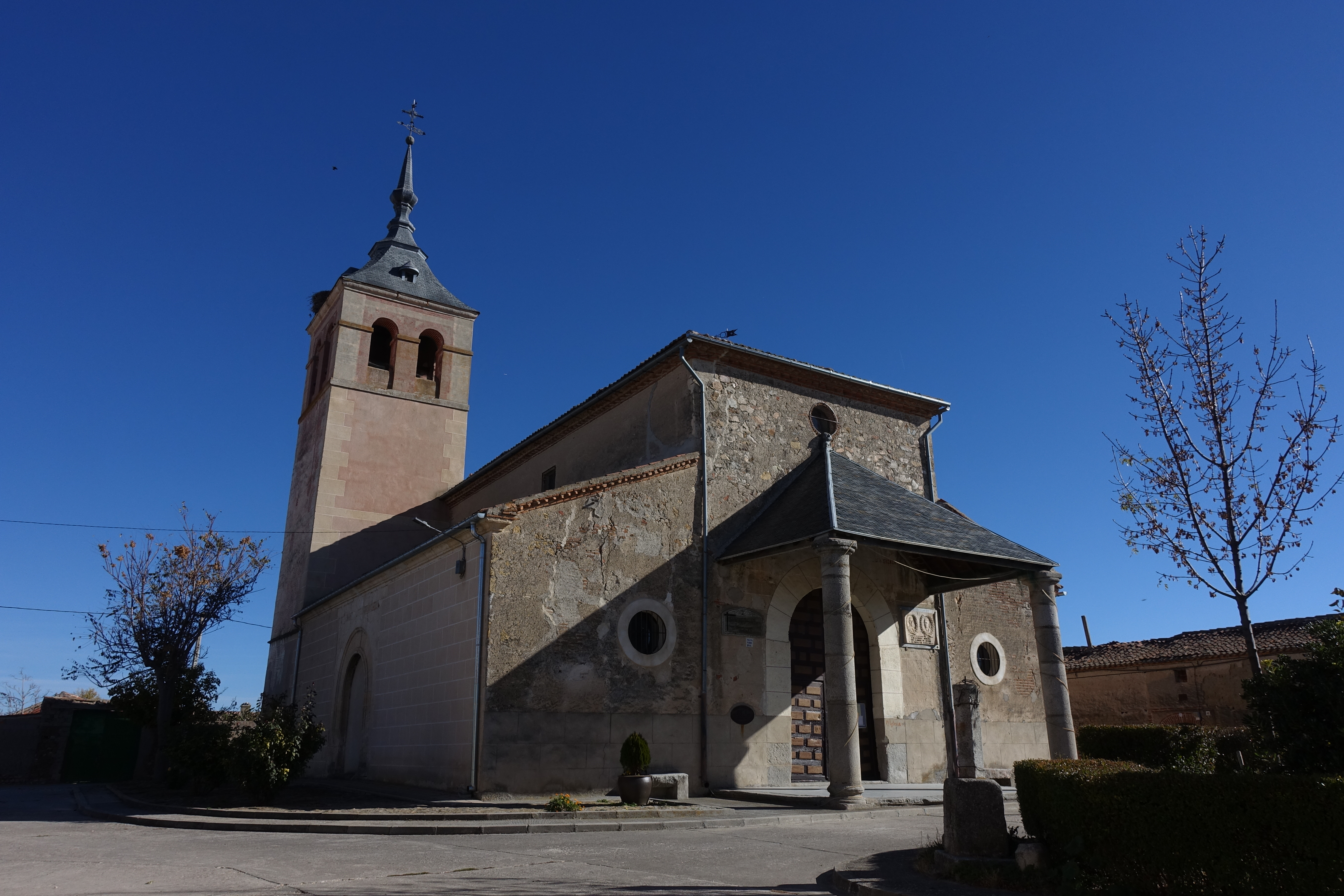 Iglesia de la Asunción, Marazuela (Segovia, España).